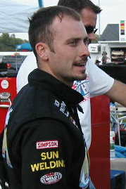 Dave Steele at IRP